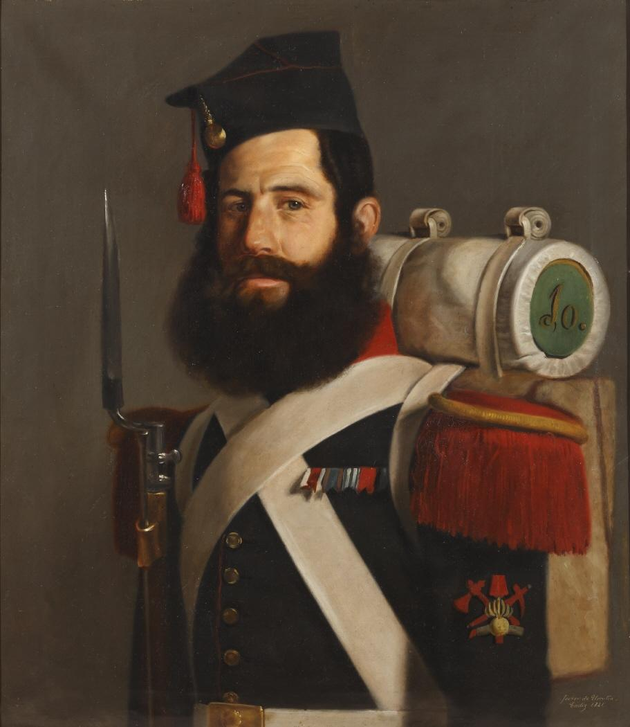 Retrato del gastador José Robles, soldado del regimiento de Murcia.